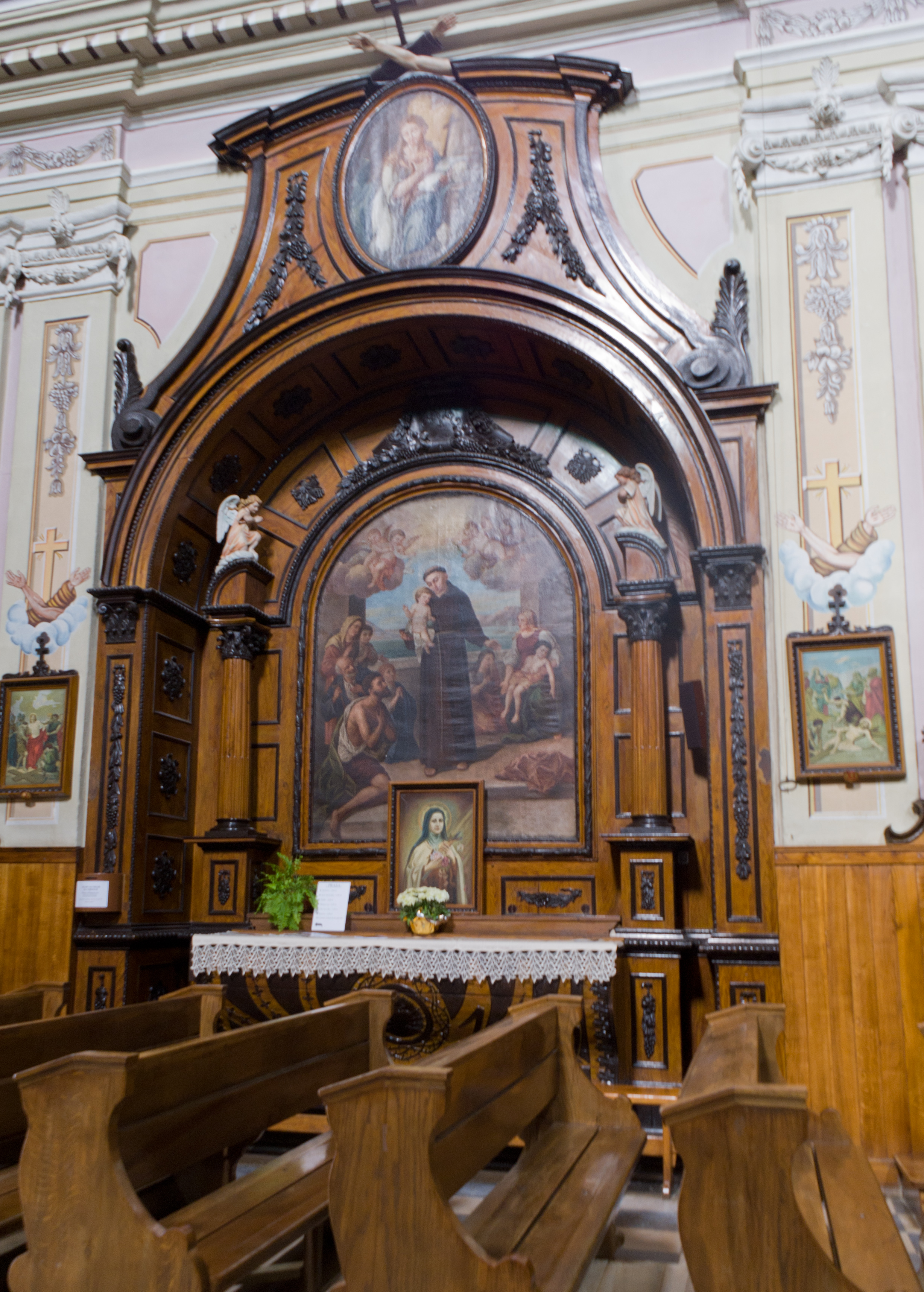 Ołtarz po lewej stronie kościoła oo. Kapucynów w Krośnie